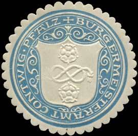 Sealing stamp Title: Bürgermeisteramt Contwig-Pfalz Description: blau, weiß, geprägt Place: Contwig/Pfalz size: 4 cm